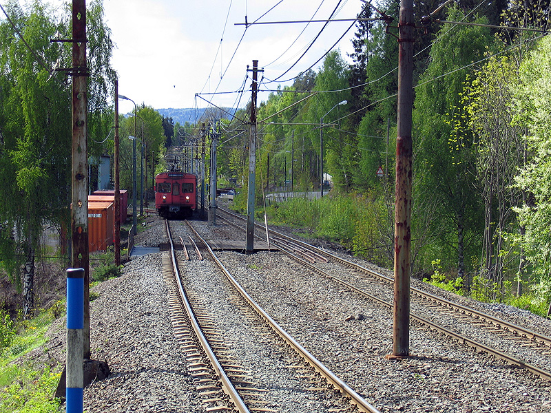 Et 1300-tog, anført av T8-vogn 1346, passerer Durud på vei mot Avløs mot Oslo, 14. mai 2006. Bildet er tatt fra inngående plattform på Avløs stasjon.